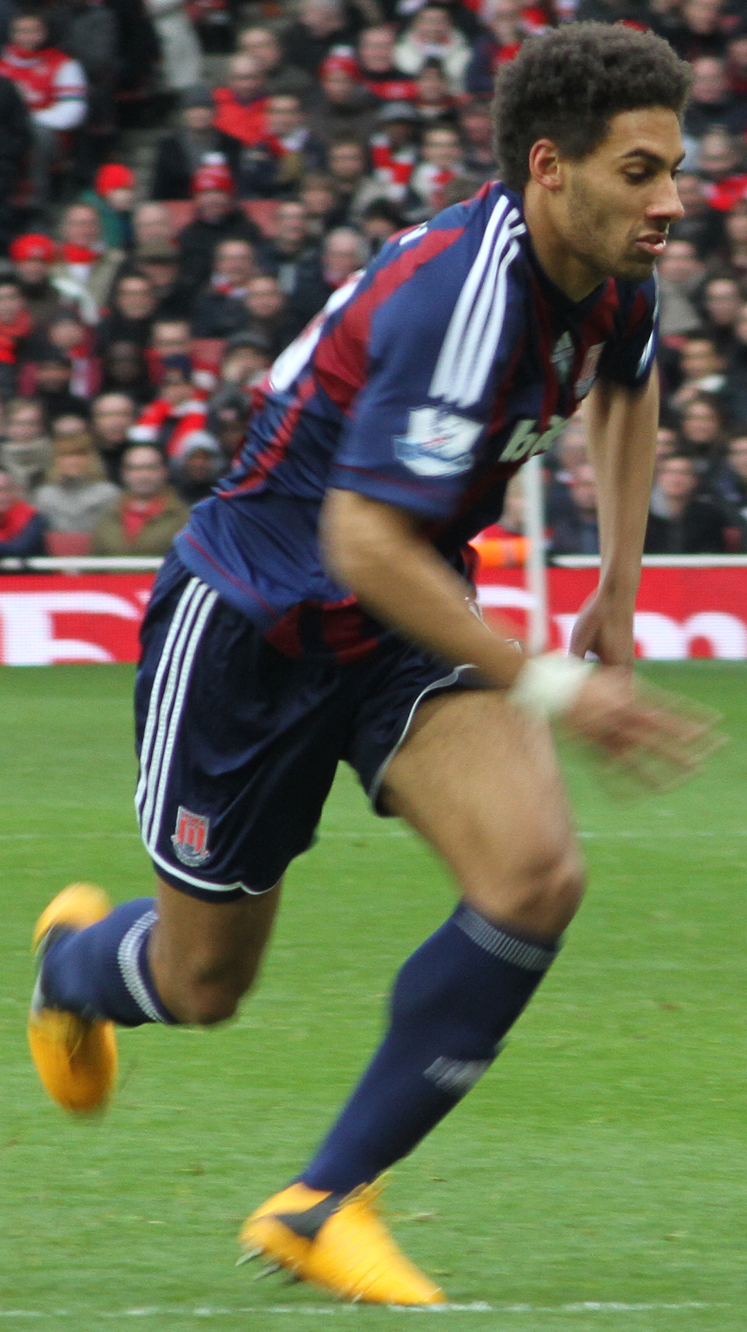 Arsenal vs Stoke, February 2013.